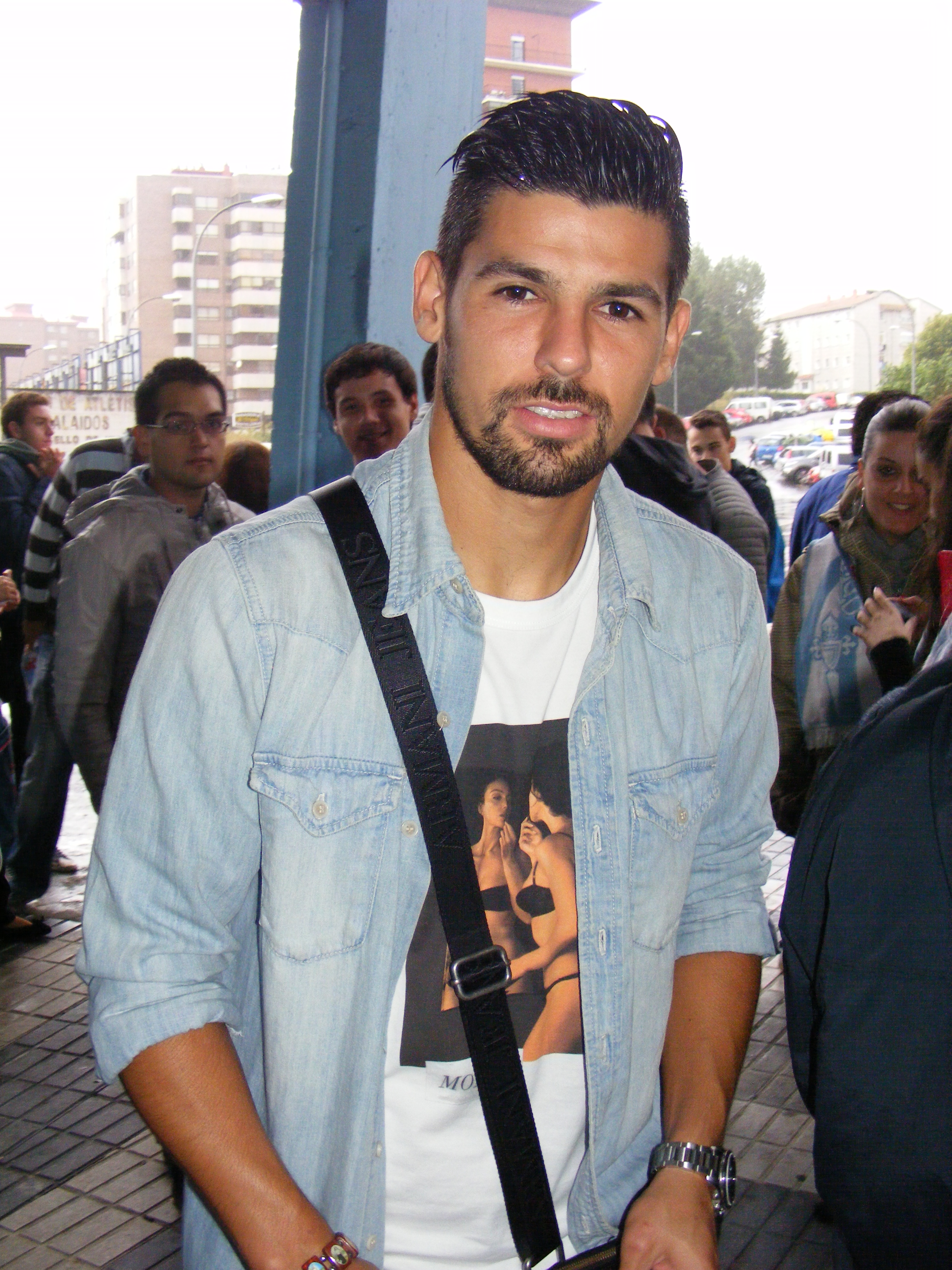 Nolito después del partido Celta-Elche